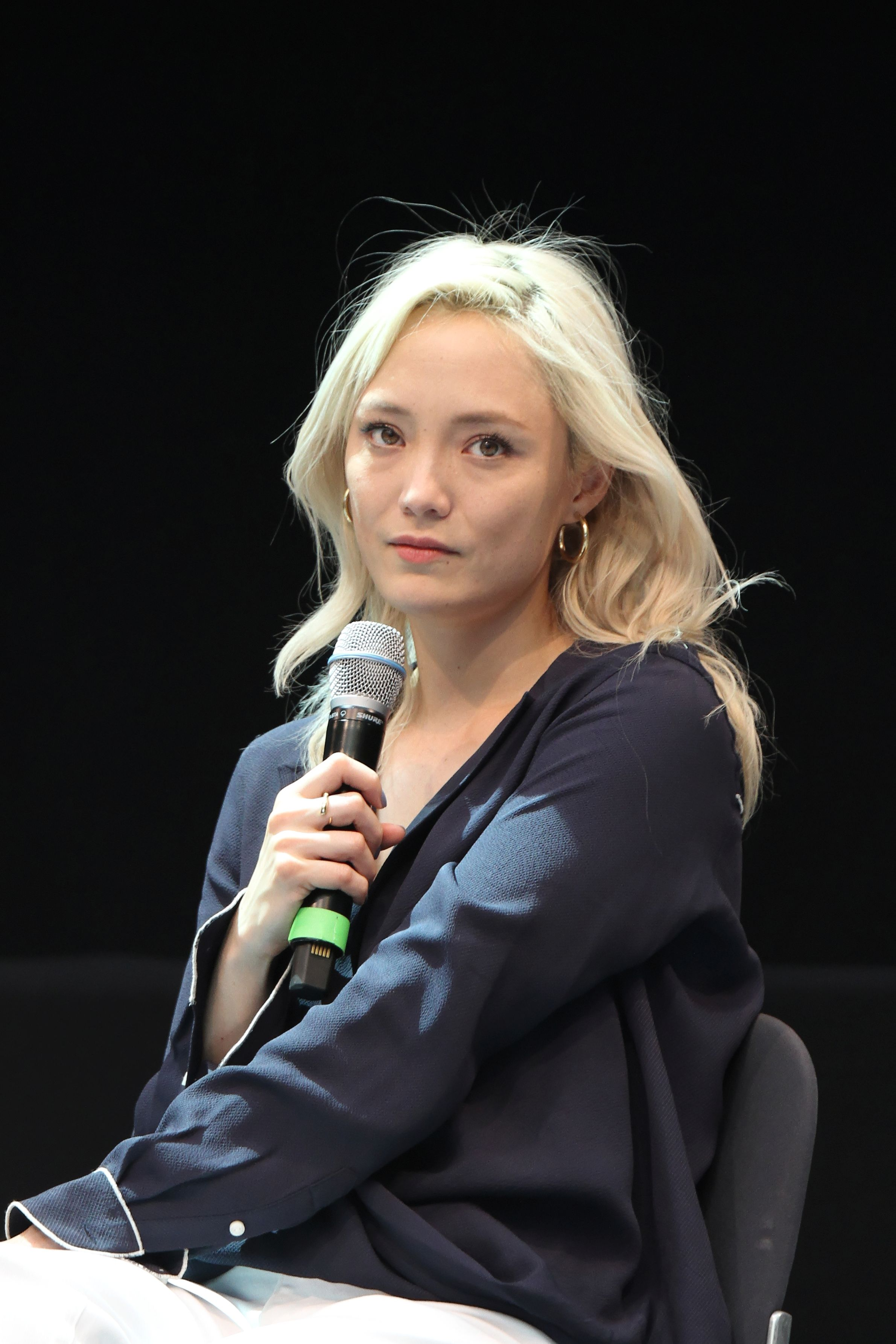 Bilder von der Comic Con Germany 2019 in Stuttgart